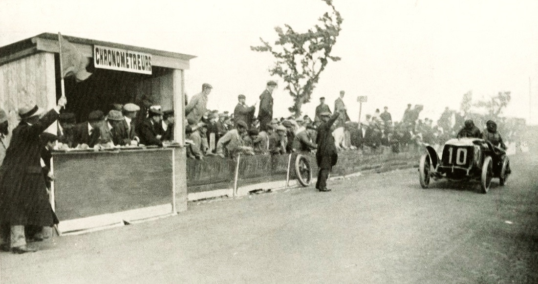 Paul Bablot, vainqueur de la Coupe des Voiturettes 1911 (La Vie au Grand Air du 1er juillet 1911, p.443)